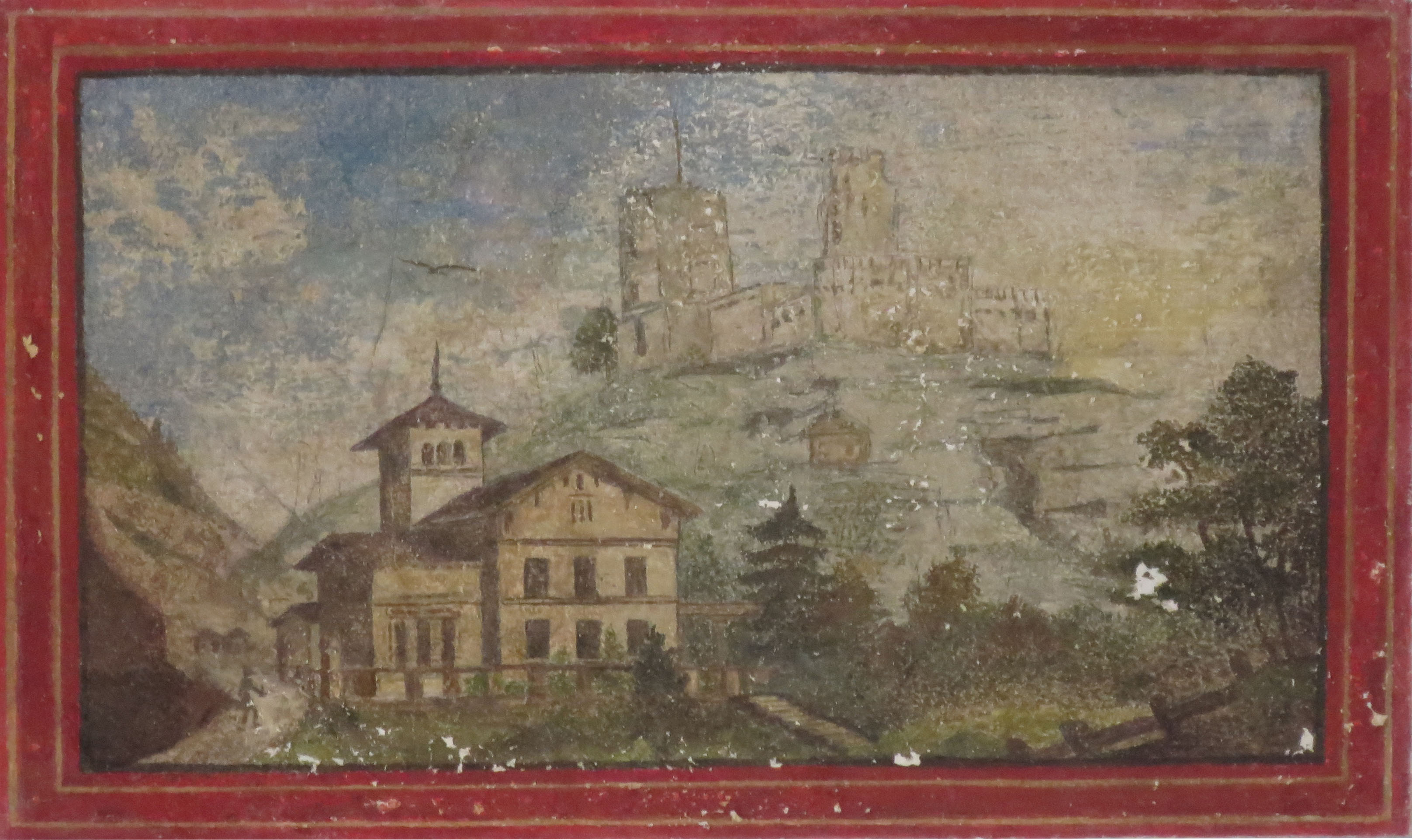 Wandmalerei im Festsaal der Villa Denis, Diemerstein. Gezeigt wird die Villa selbst.